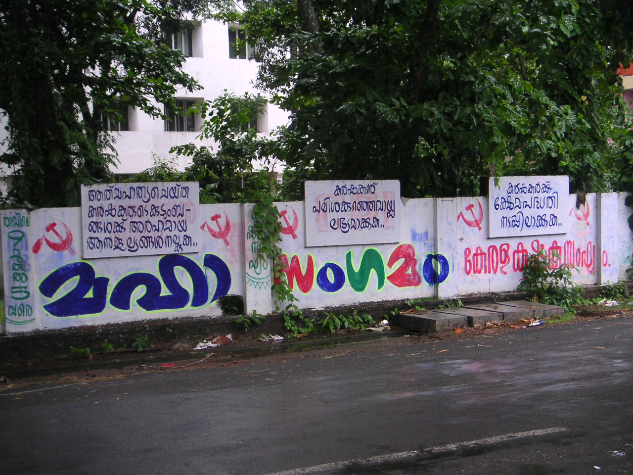 Kerala Karshaka Sangam mural, Allepey, Kerala. Photo: Soman